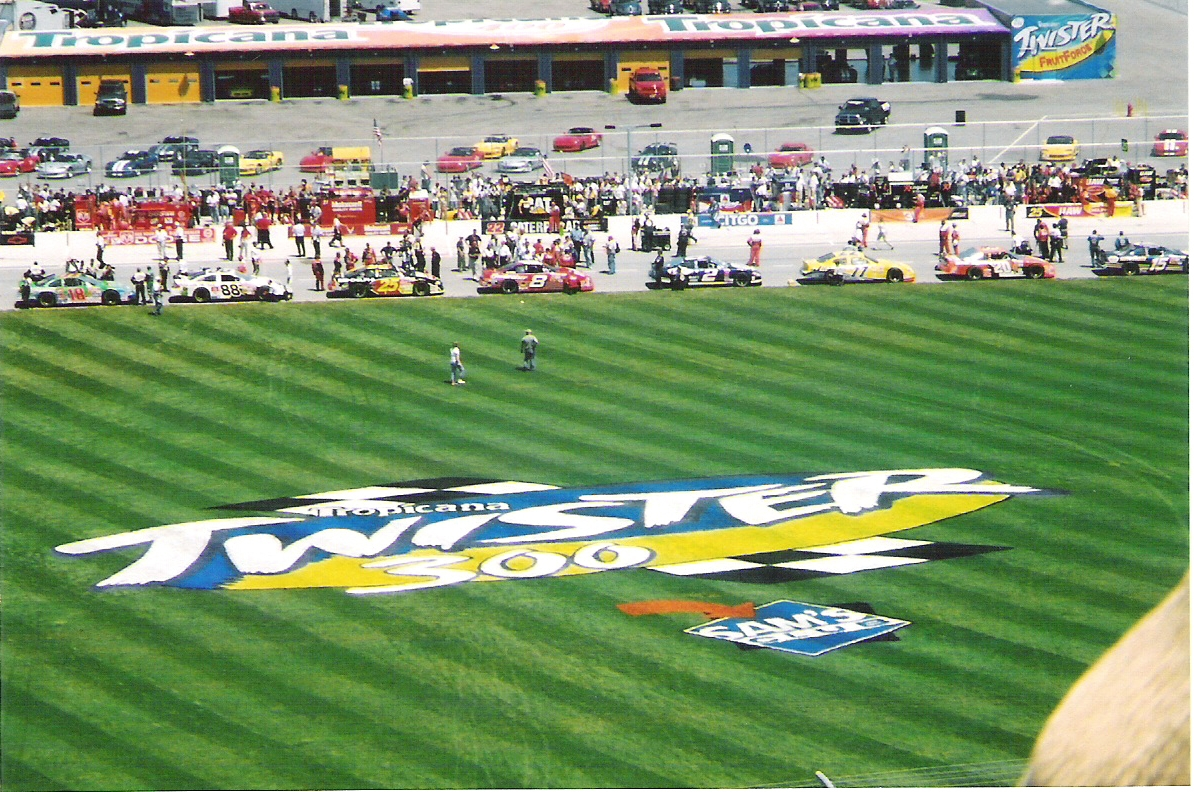 2002 Tropicana 400 Pre-race